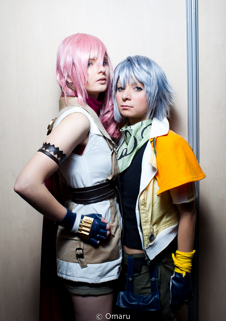 Paris Manga 10, September 2010, Parc des expositions de la porte de Versailles.